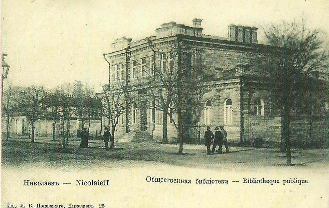 Листівка миколаївської громадської Бібліотеки